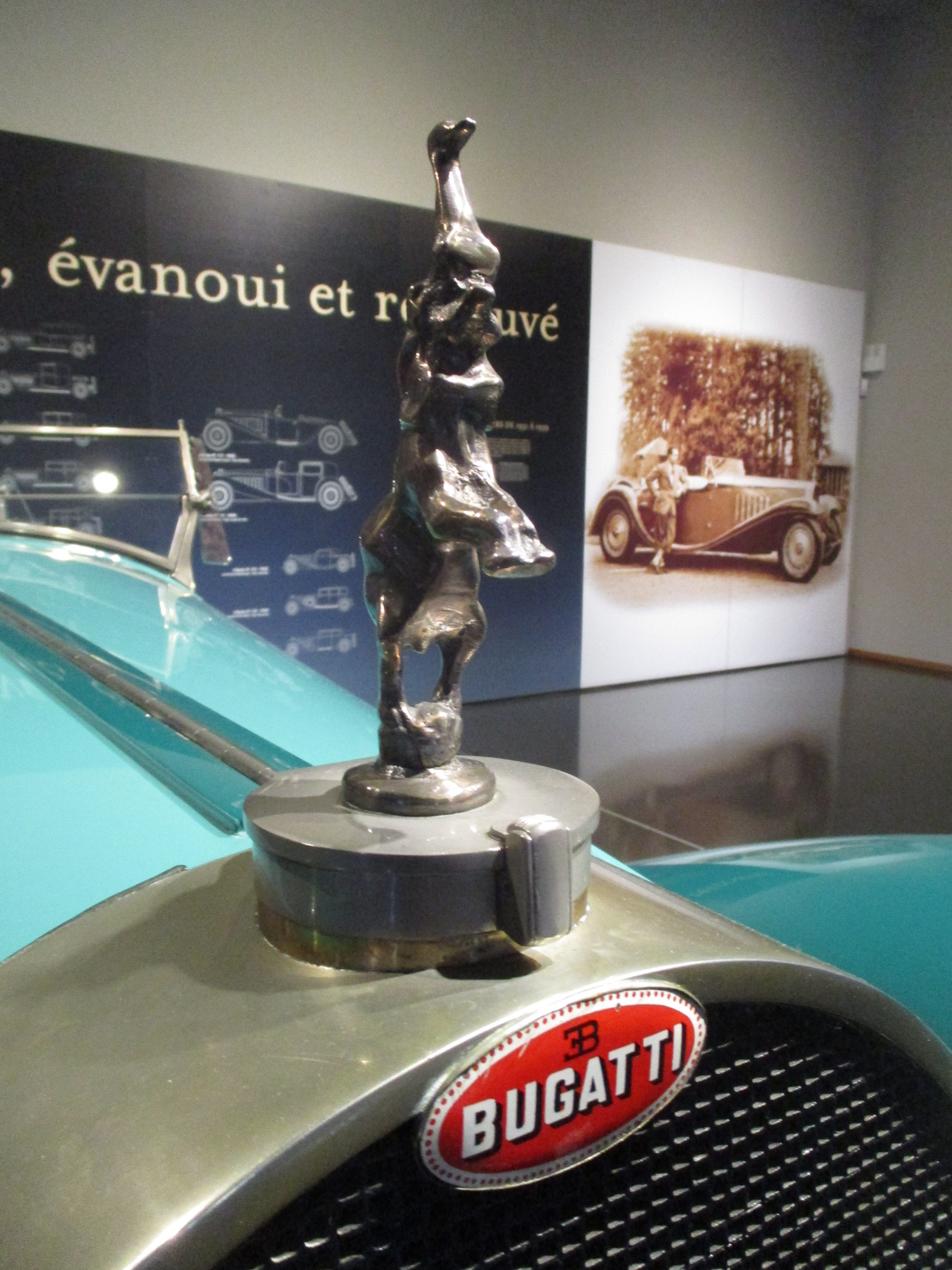 Bugatti Royale Roadster Esders (Cité de l’automobile de Mulhouse)